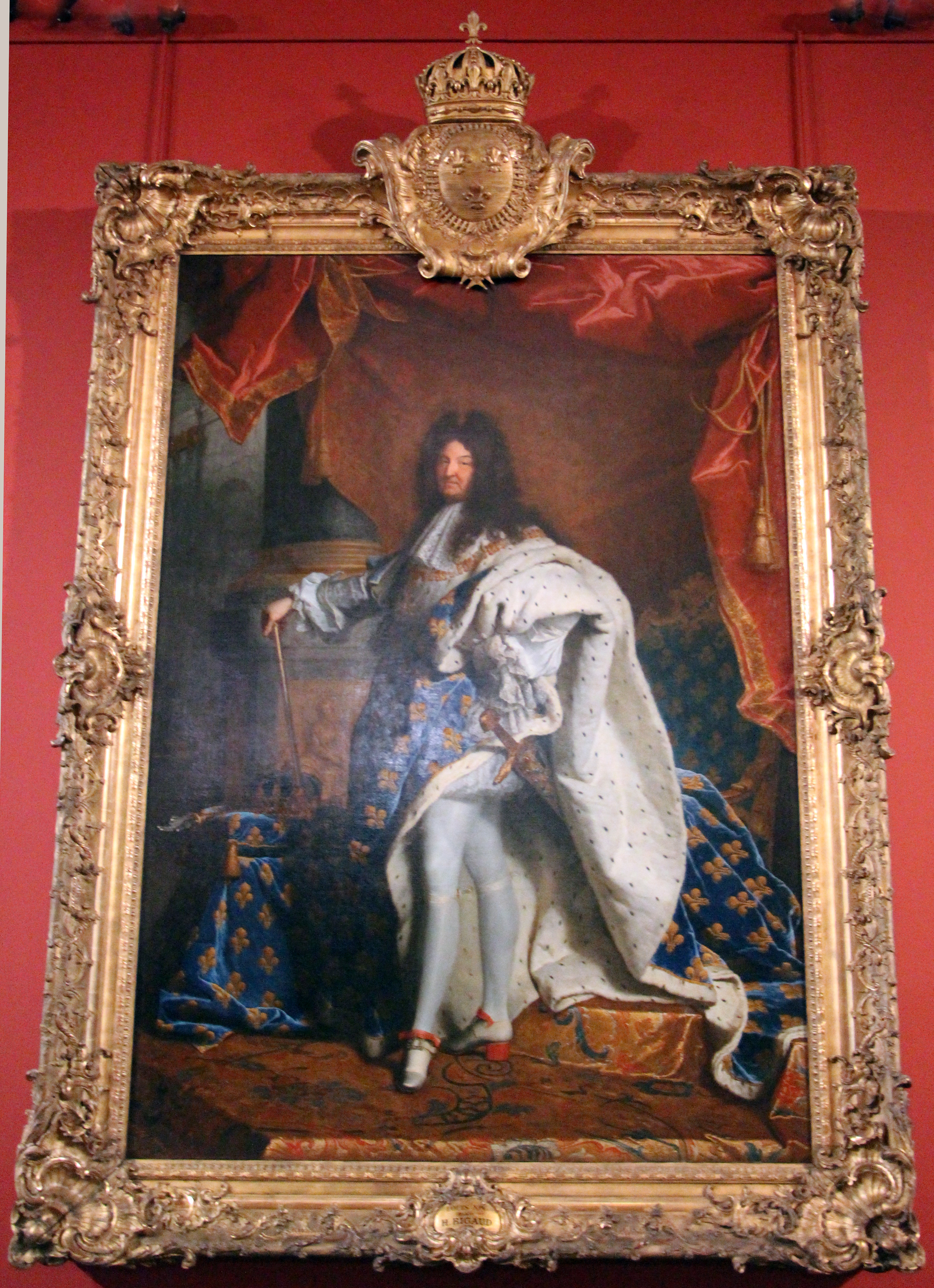 French paintings in the Louvre